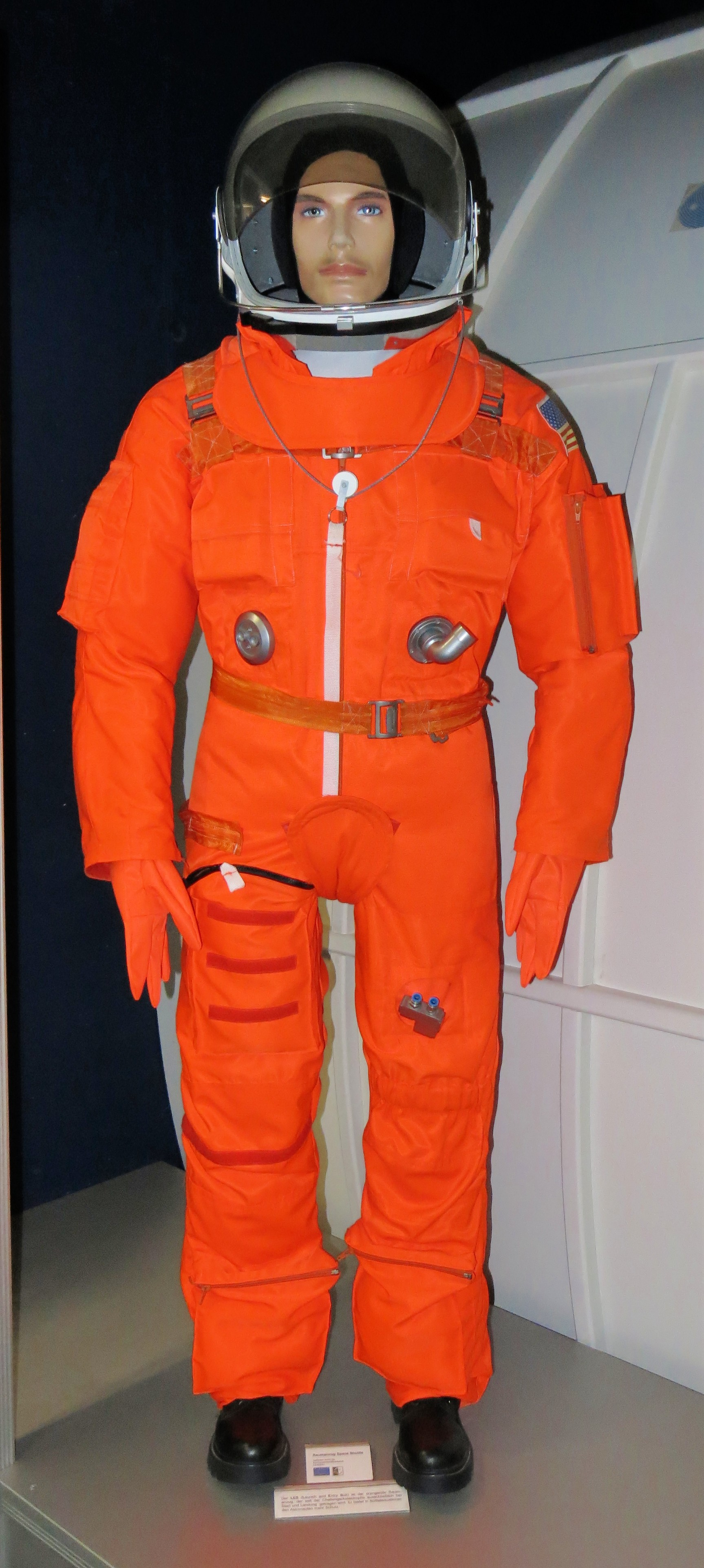 Launch and entry suite, Exponat Deutsche Raumfahrtausstellung